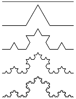 Koch-kurvans utveckling i fem iterationer, en fraktal. Kategori:Bilder av fraktaler